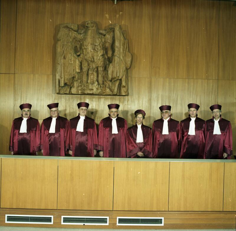 18.12.1989 Bundesverfassungsgericht Karlsruhe I. Senat in alter Zusammensetzung (bis 15.6.1989) v.li.: Prof. Dr. Alfred Söllner, Dr. Otto Seidl, Prof. Dr. Hermann Heußner, Präsident Prof. Dr. Roman Herzog, Dr. Gisela Niemeyer, Prof. Dr. Johann Friedrich Henschel, Prof. Dr. Dieter Grimm, Prof. Dr. Thomas Dieterich